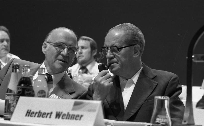 Außerordentlicher Parteitag der SPD in der Westfalenhalle Dortmund